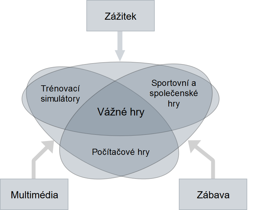 Vážná hra je složená ze tří komponent: zážitku, zábavy a multimédií. Z diagramu je též patrné, jaké jsou rozdíly mezi termínem vážná hra a simulátorem, počítačovou hrou nebo sportovní či společenskou hrou.